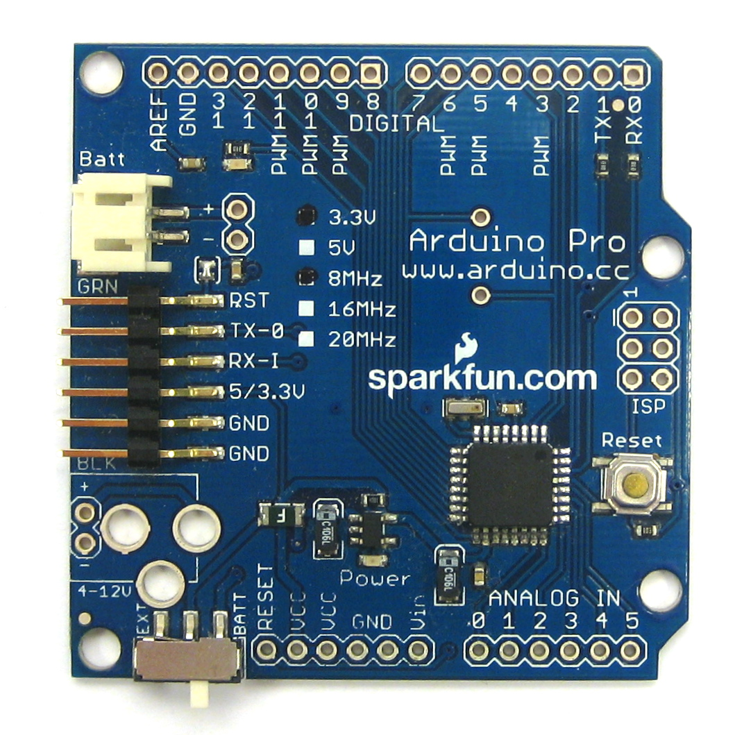 arduino.cc/en/Main/ArduinoBoardPro